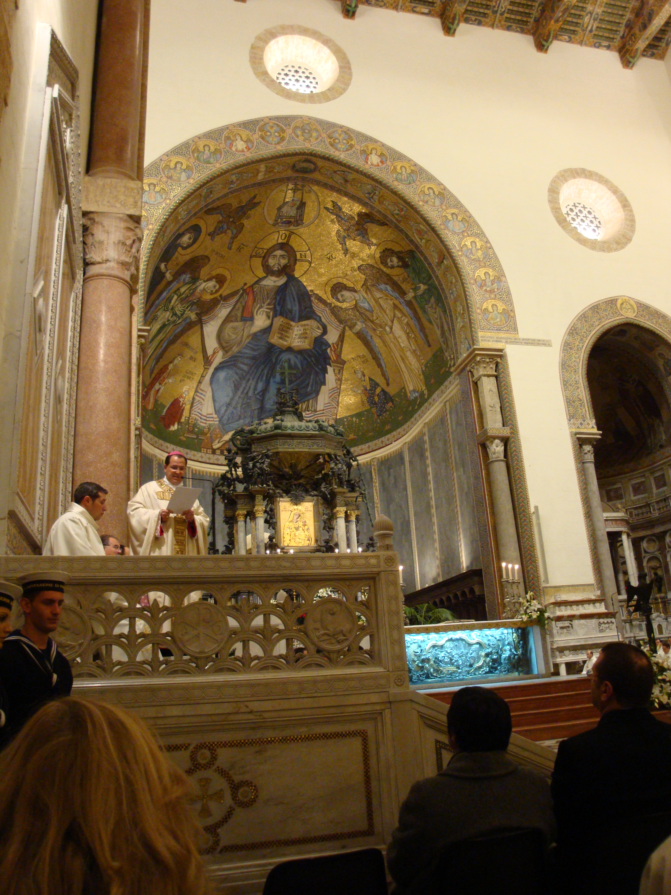 Autore: Tony Frisina - Alessandria